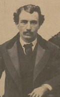 David Alston